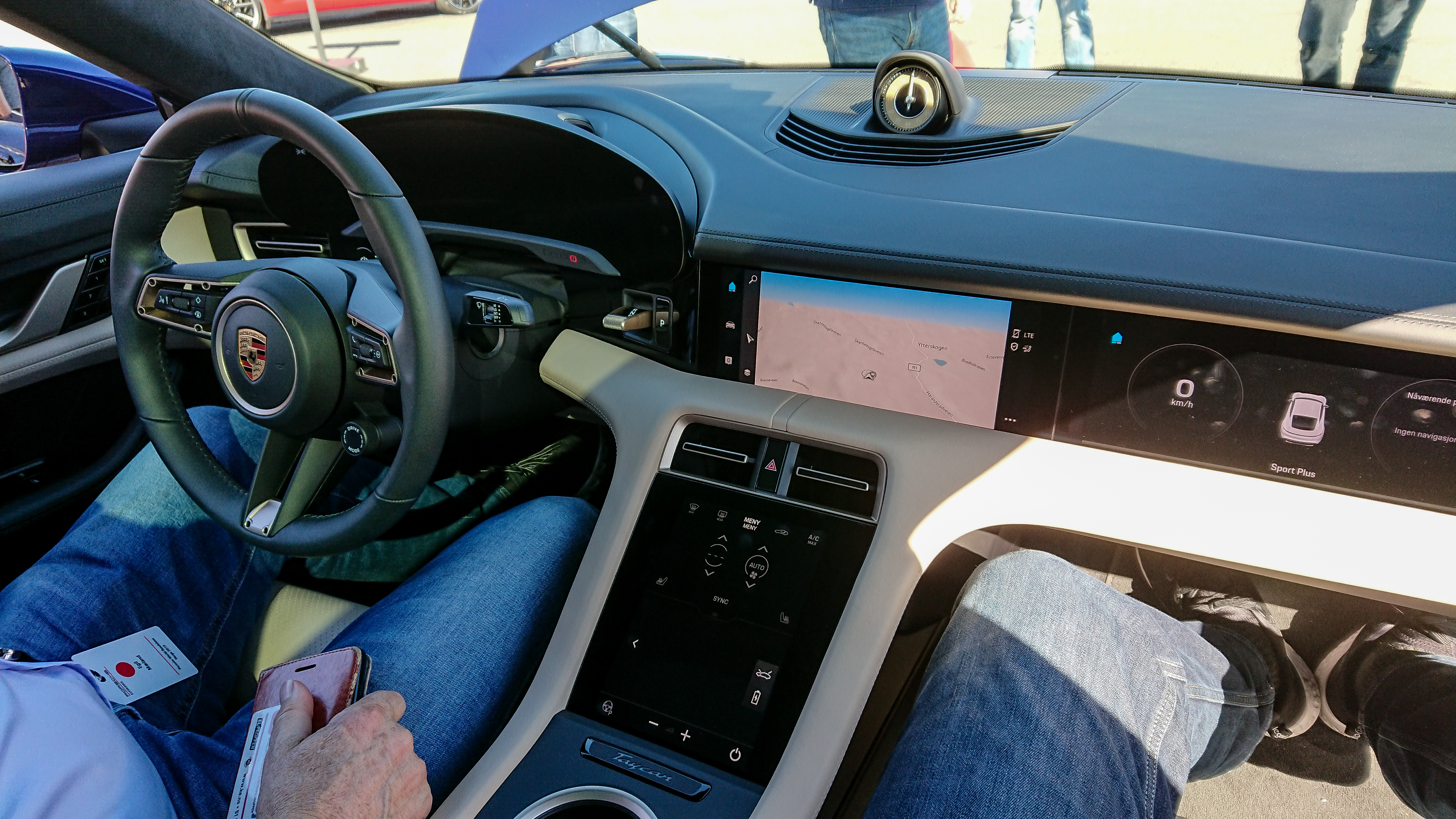 Rudskogen 2019